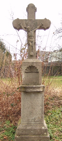 Wegekreuz – Ort: Bonn Im Gensem (auf dem Damm – Schwarzrheindorf) Inschrift: DIESES CREVTZ/IST VON HENDER=/=ICH WEINGARTS/VND SEBILLA/BELLENG/AVSENS/EHLEUTH AVFF/GERICT ZV/EHREN IESUS/UND MARIA/1724 über der Nische: HERR ERBARME/DICH VNSER linker Pfosten: HERR/GETE=/=NCK/MEIN/ER rechter Pfosten: AN MEI/NEM Trittstufe: ALLES MEINEM GOTT ZV EHREN/GIB 0 JESV GNAT DARZV Material: Stenzelberger Andesit Literatur: Ruth Hacker-de Graaff: Wegekreuze im Bonner Raum. Bouvier, Bonn 1991, ISBN 3-416-80671-9, S. 190